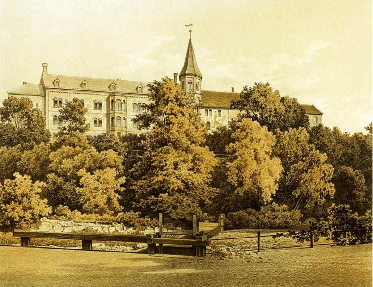 Schloss Ilsenburg, Kreis Wernigerode